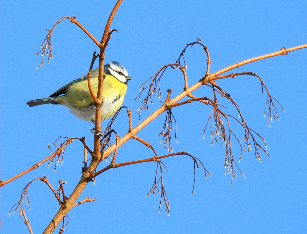 Scientific name: Cyanistes caeruleus Original file: DSCN5134-new